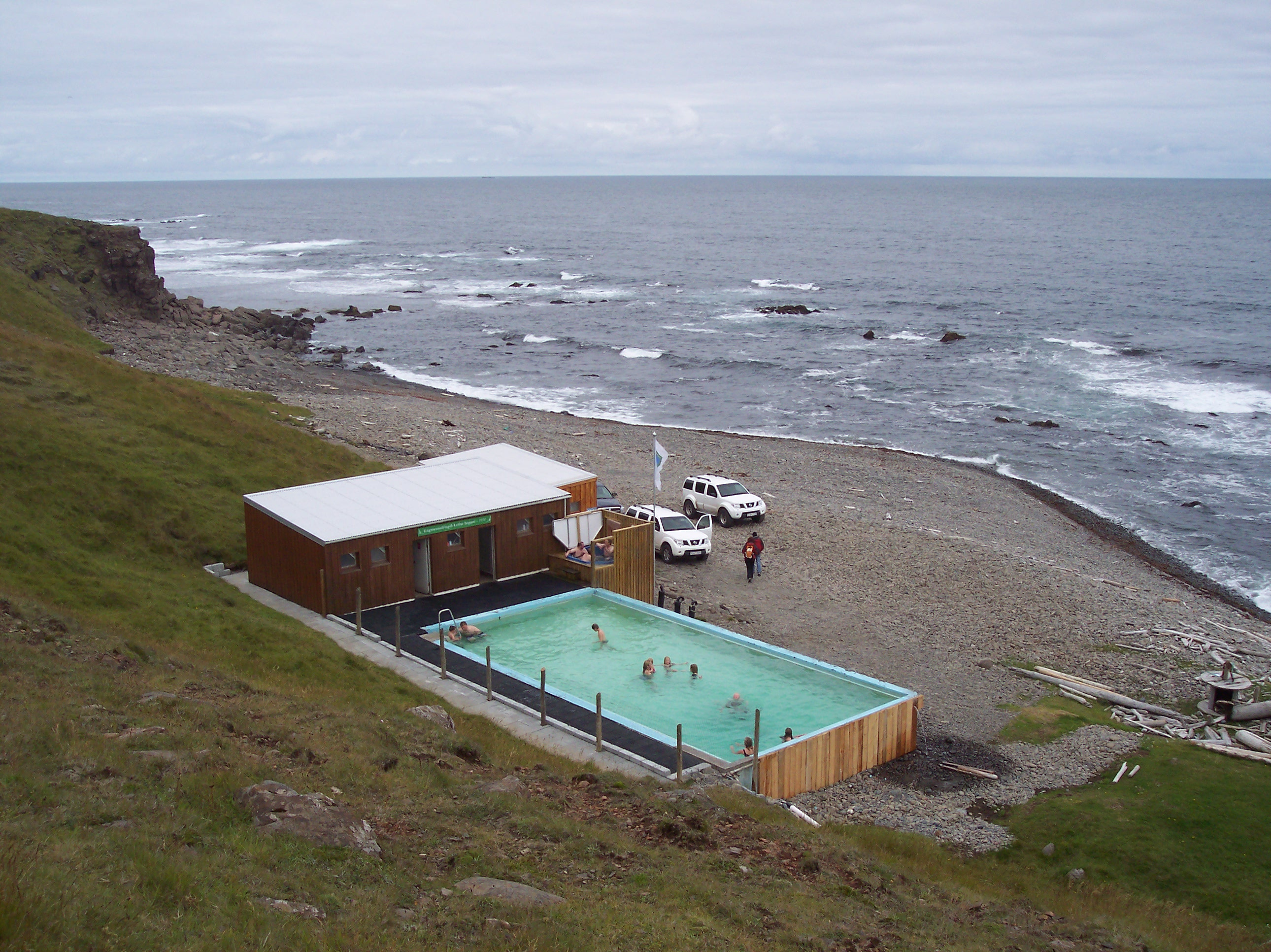 Krossneslaug í Árneshreppi á Ströndum.